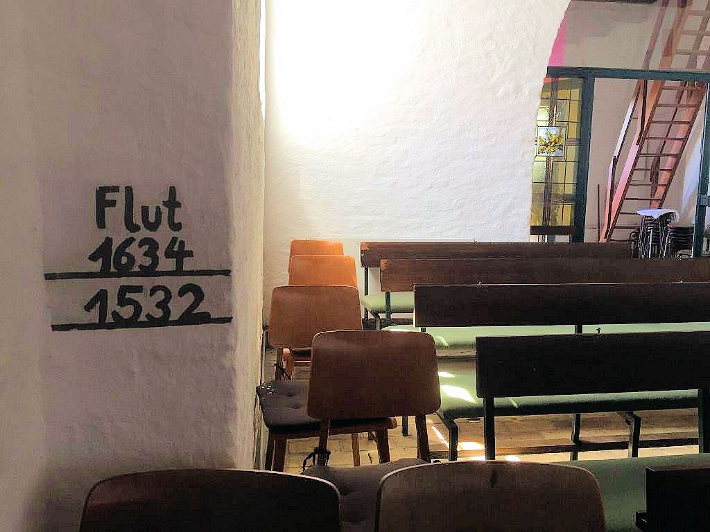 Flutmarken an der Innenseite der Kirche in Klixbüll im Durchgang zur Sakristei. 1532 (Allerheiligenflut 1532) und 1634 (Burchardiflut). Die Höhenmarke der Allerheiligenflut 1532 (NN+4,16 m) gilt als die älteste einer Nordseesturmflut.